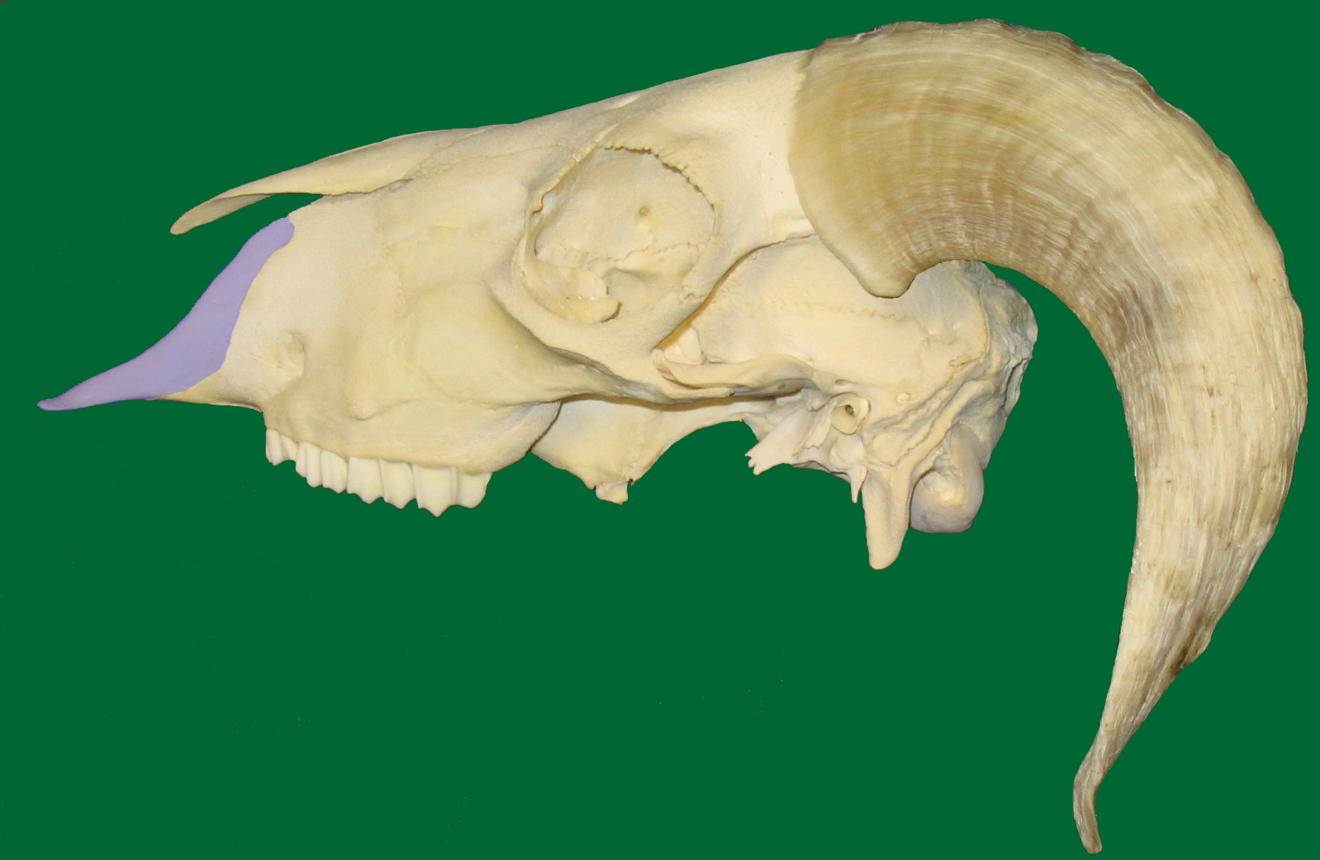 Skull of a sheep. Os incisivum marked bluish Schädels eine Schafes. Zwischenkieferbein (Os incisivum) farbig markiert